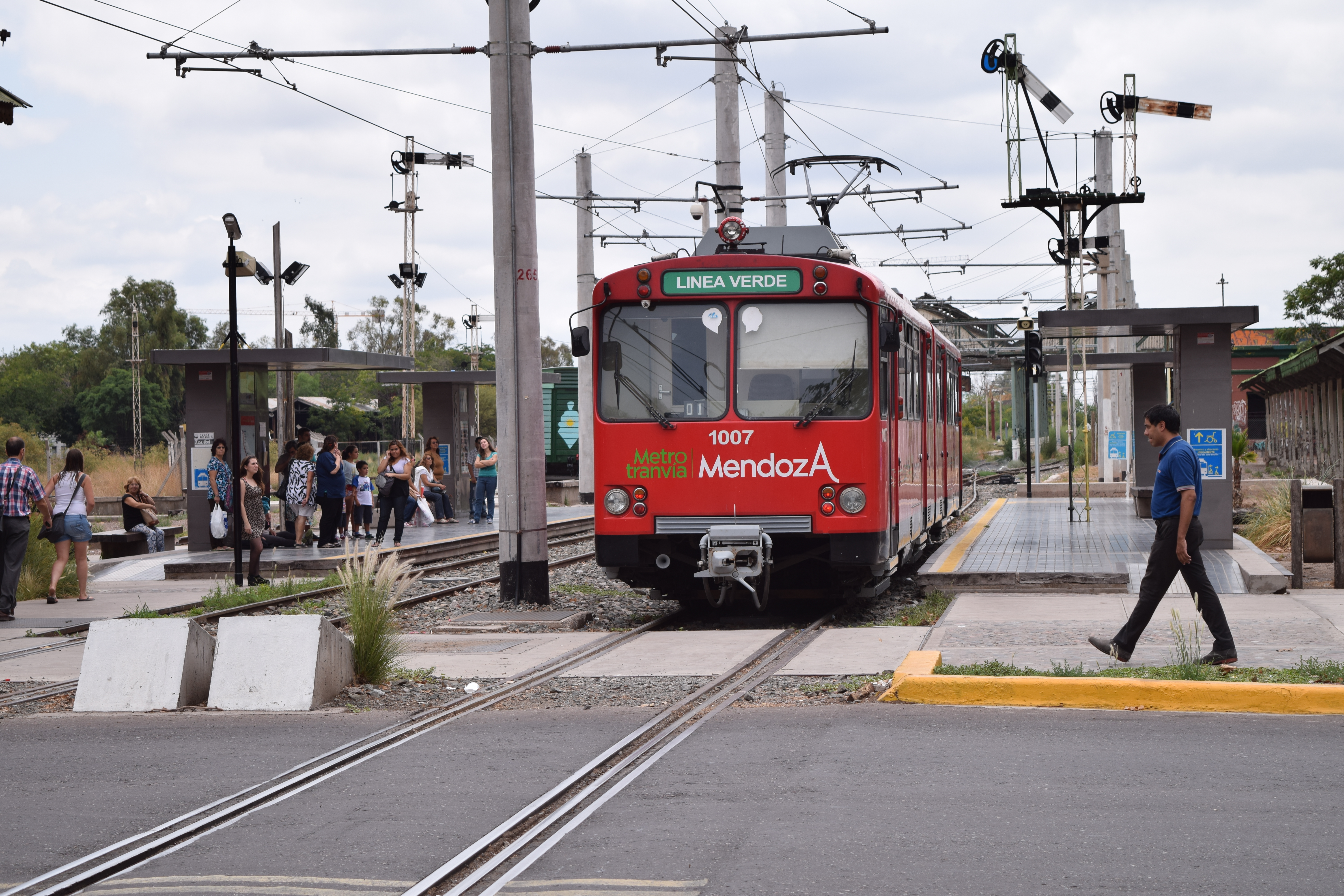 Siemens–Duewag U2 ingresando a la estación o parador Mendoza